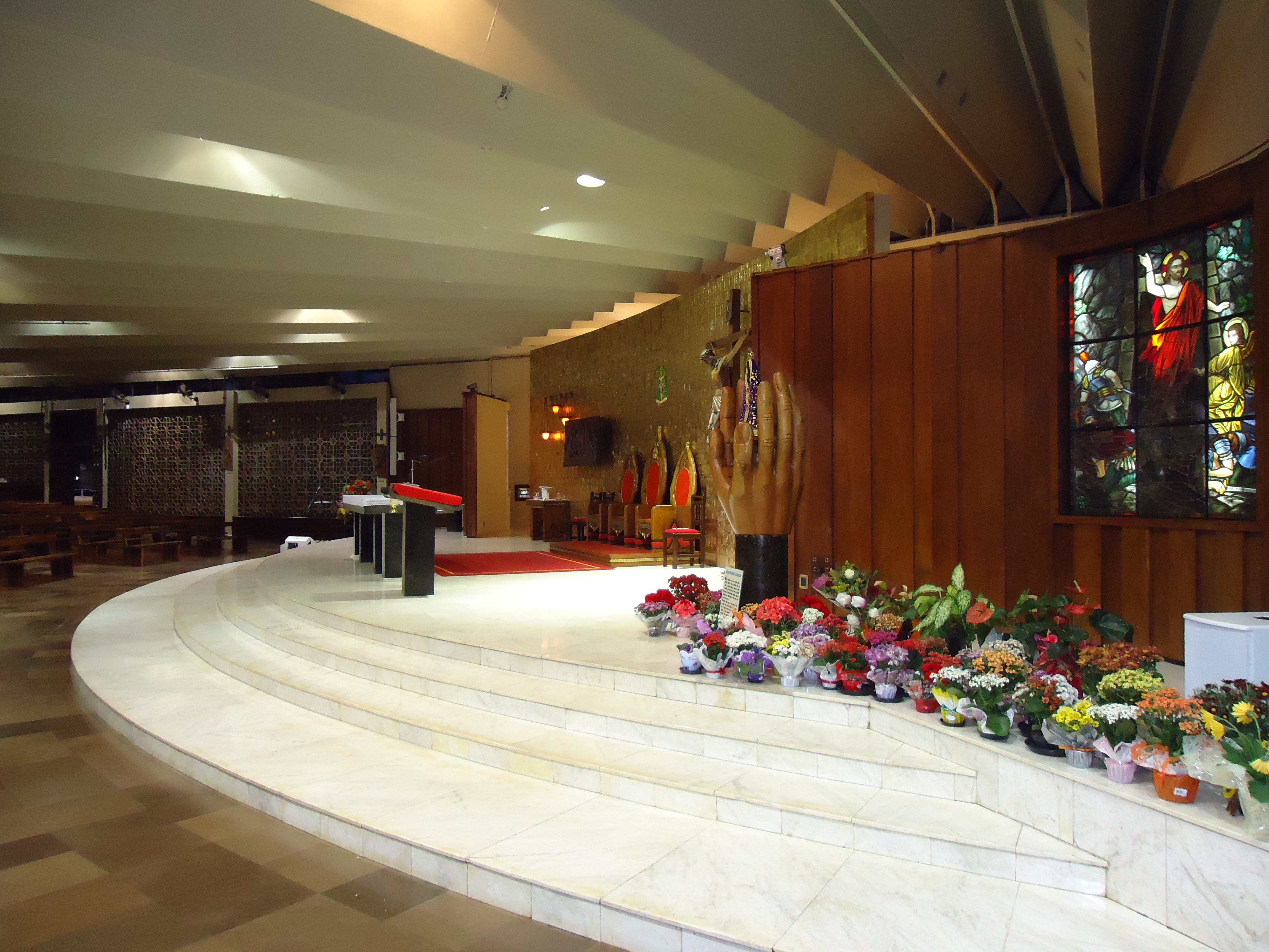 Interior da Catedral Nossa Senhora Aparecida (Cascavel-PR)